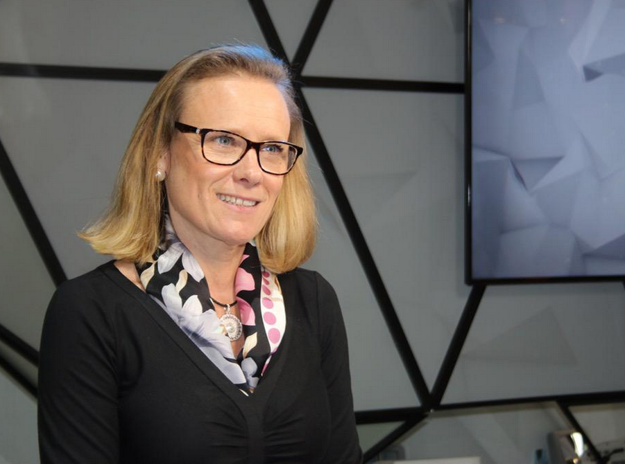 Belén Garijo, Member of the Executive Board & CEO Healthcare Merck KGaA, Darmstadt, Germany